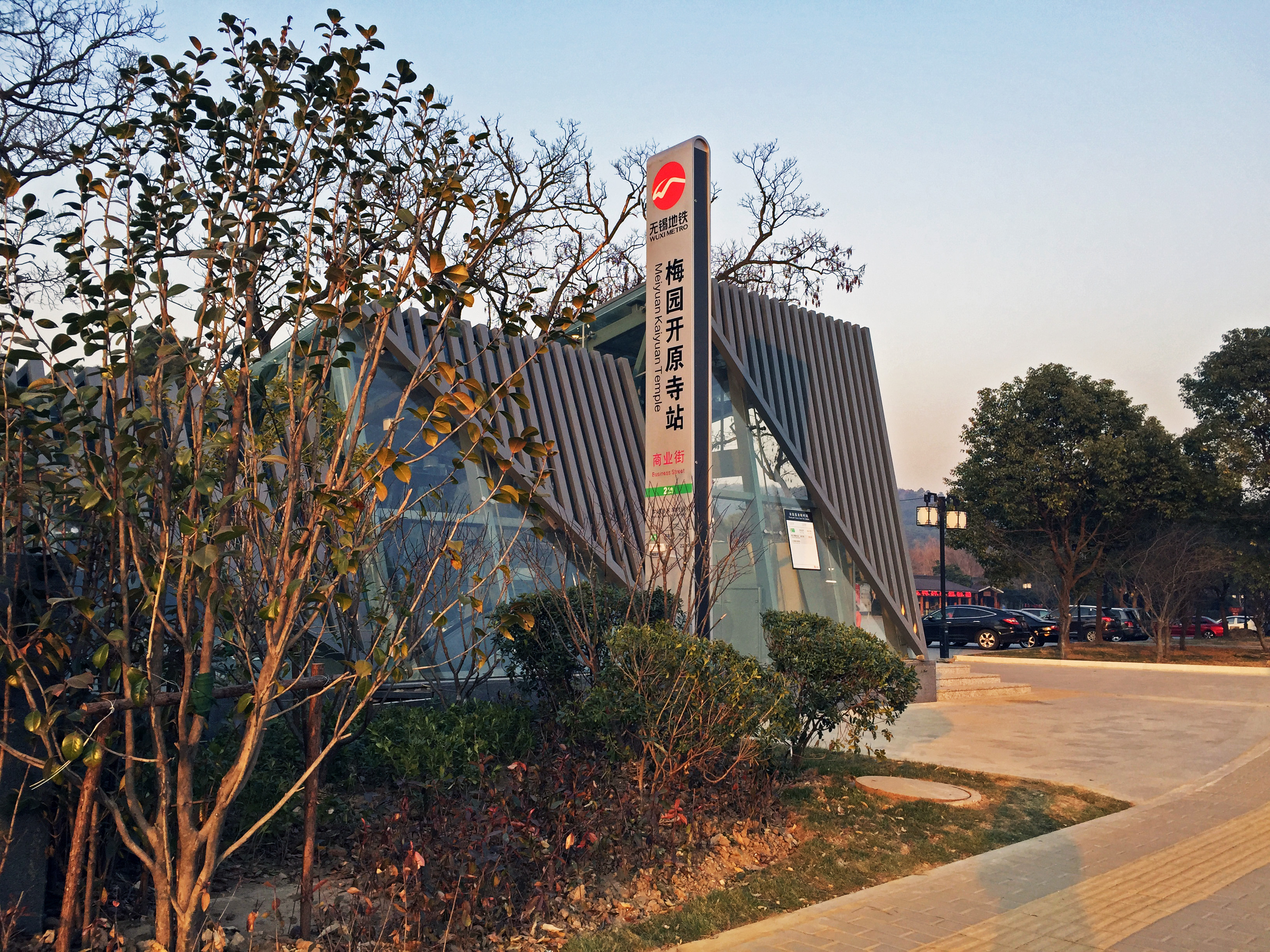 无锡地铁梅园开原寺站5号出入口